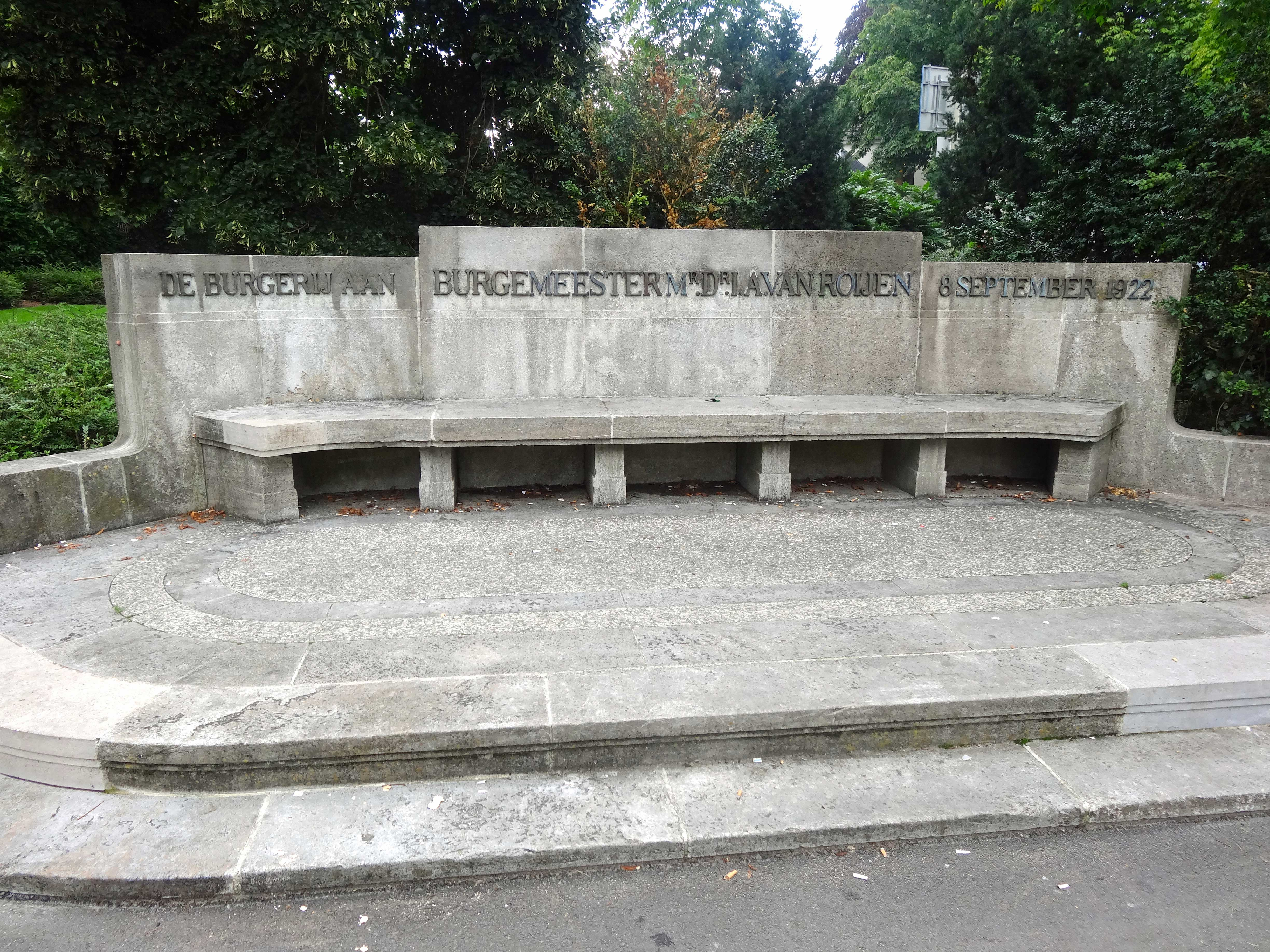 Burgemeester Van Roijenbank nabij de Wilhelminasingel in Zwolle